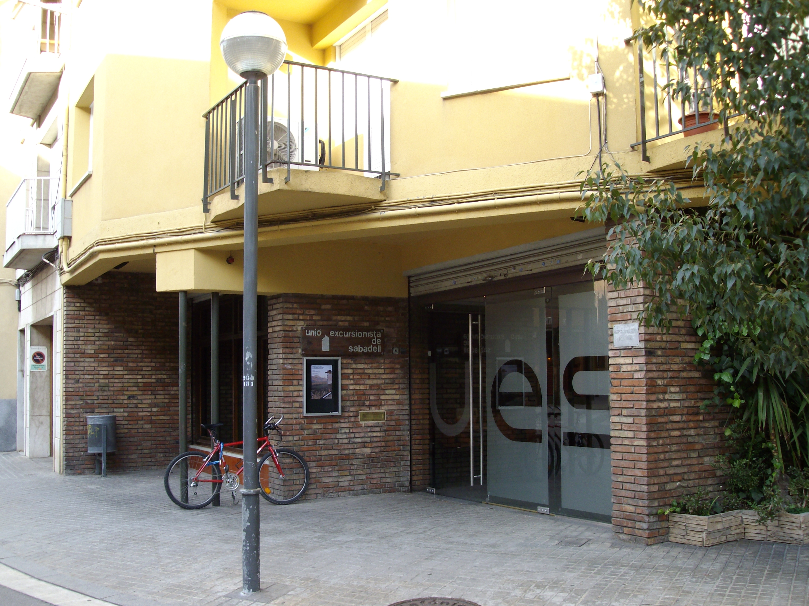 Unión Excursionista de Sabadell, situada en la calle de la Salut, 14 -16.